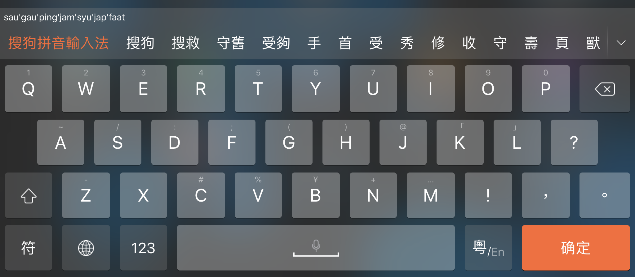 粵語: 喺iPad上使用搜狗輸入法拼音打字嘅畫面